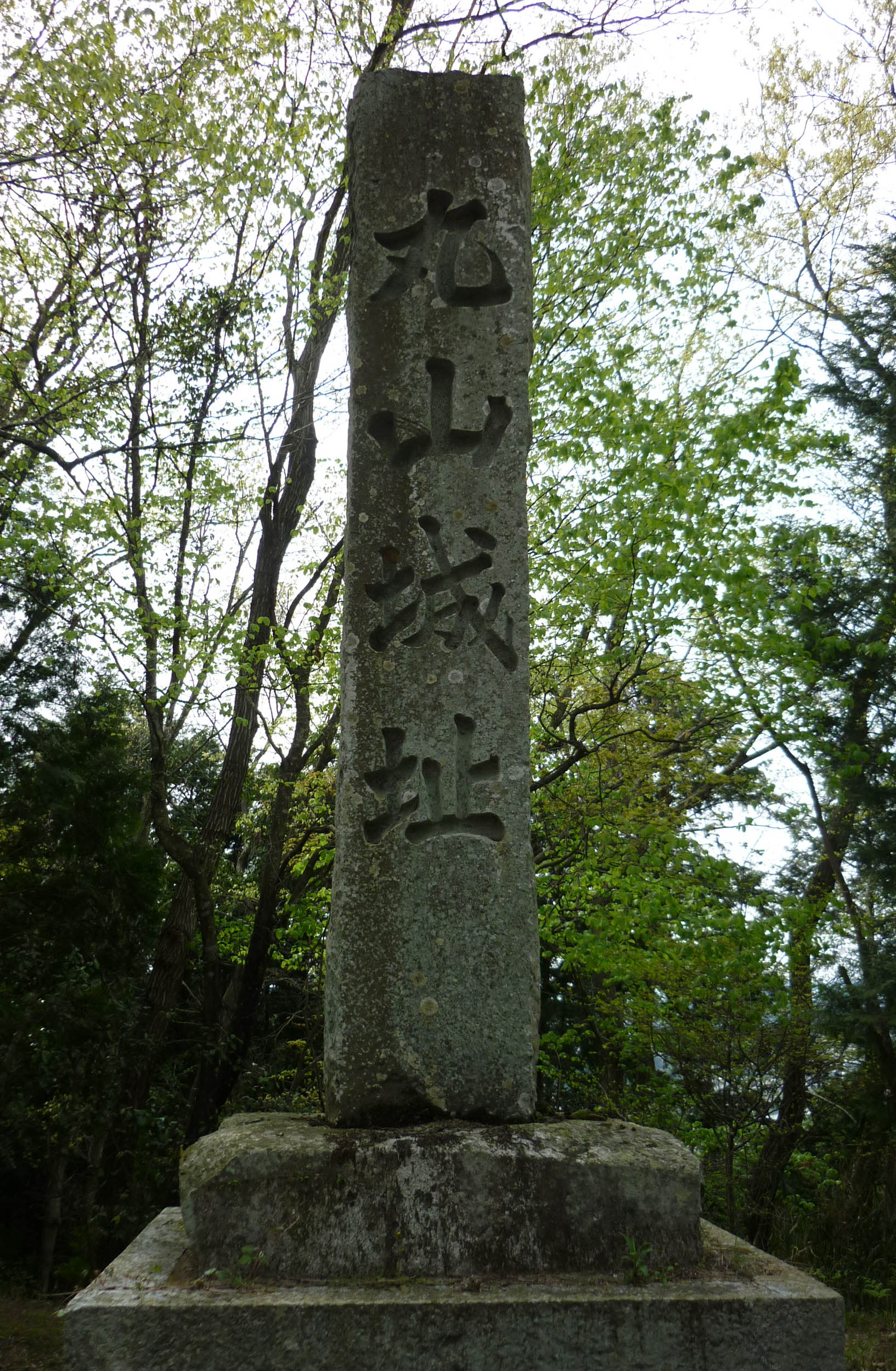 丸山城の石標